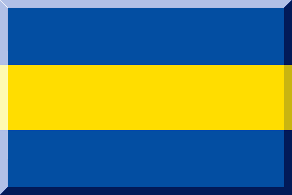 Bandierina blu con striscia gialla